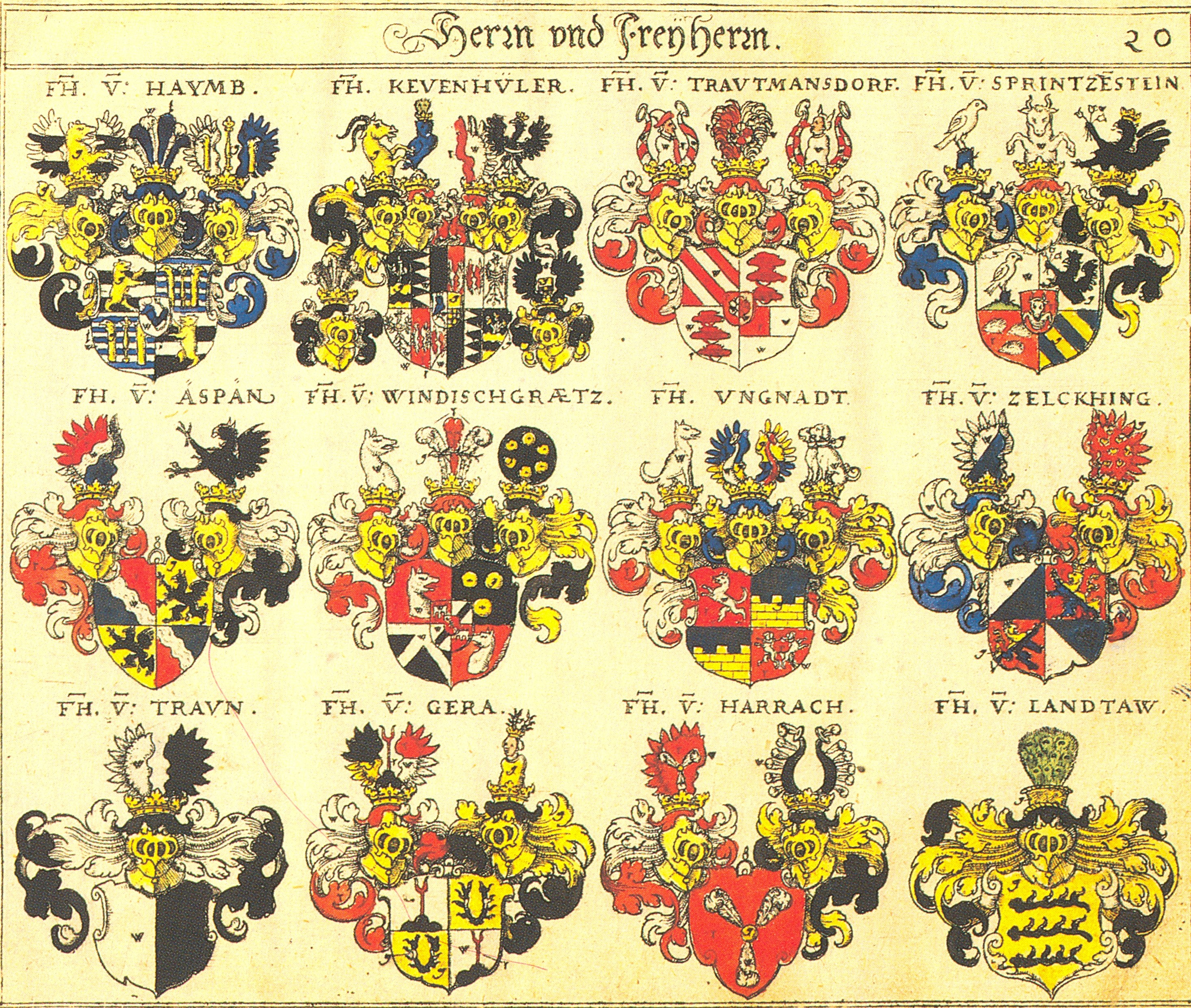 Johann Siebmacher: New Wappenbuch eingescannt aus: Horst Appuhn (Hrsg.), Johann Siebmachers Wappenbuch. Die bibliophilen Taschenbücher 538, 2. verb. Aufl , Dortmund 1989 Blatt 20